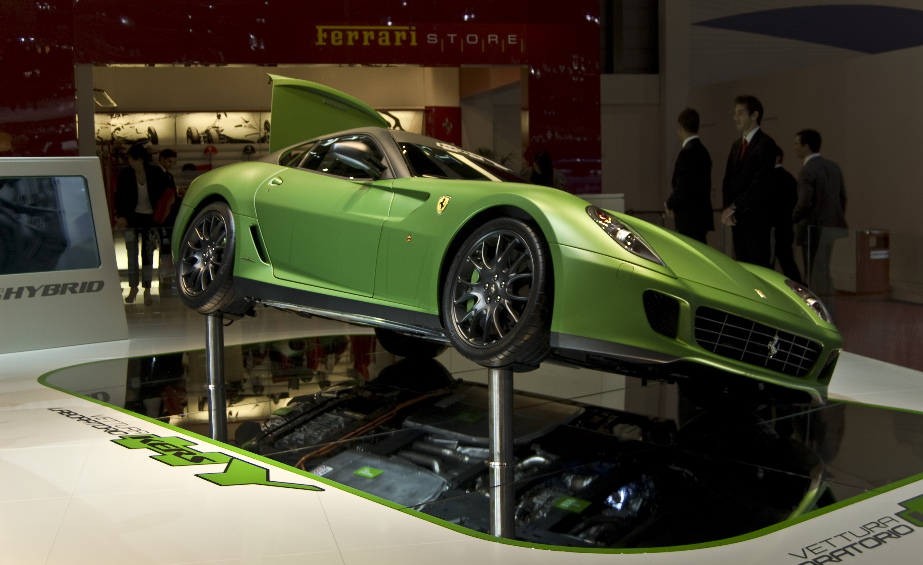 Ferrari 599 HY KERS en el Salón de Ginebra 2010.